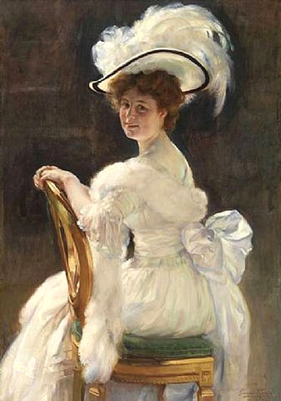 Mlle Germaine Le Blon Huile sur toile, 147 x 100 cm Collection privée